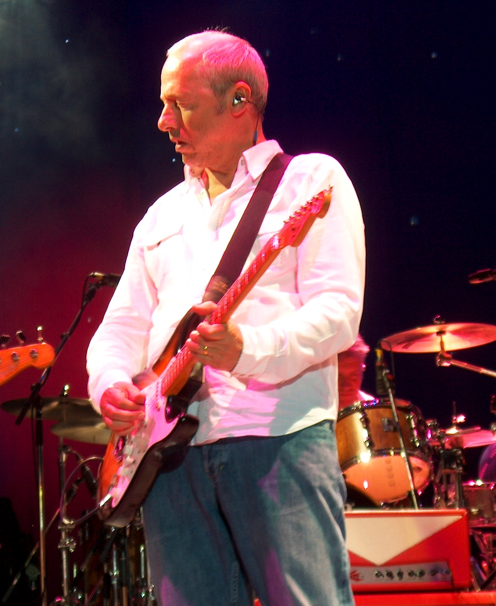 Mark Knopfler-Barcelona 2006